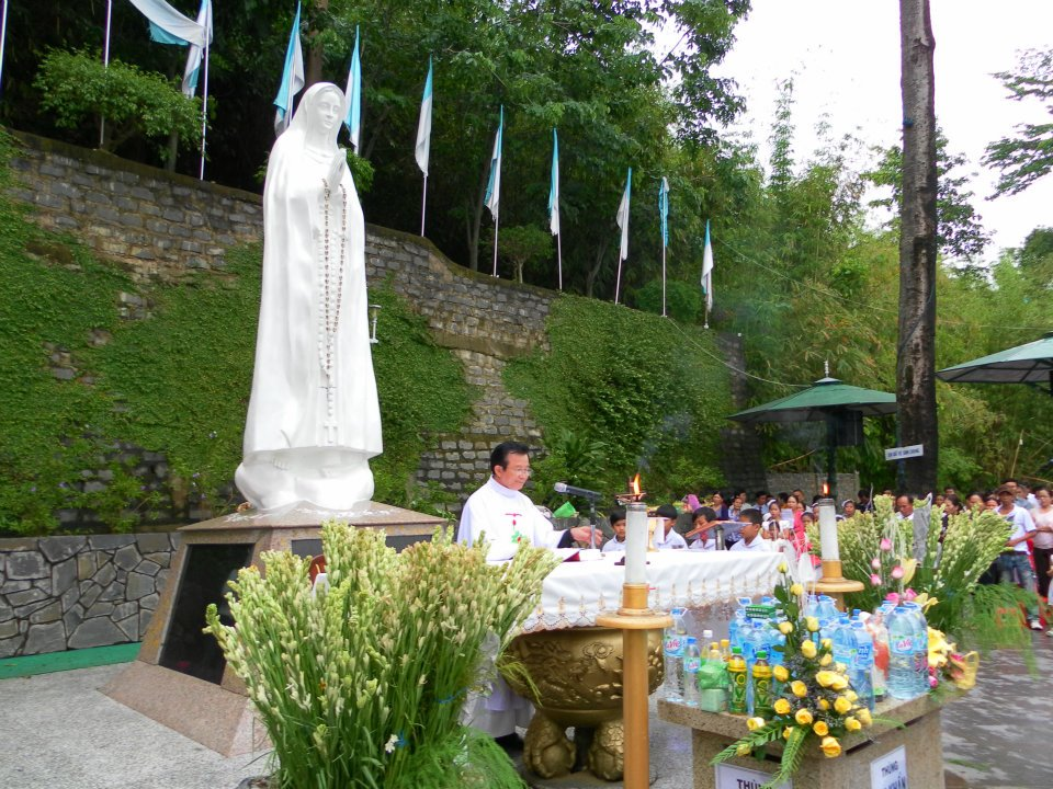 Tượng đài Đức Mẹ Tà Pao